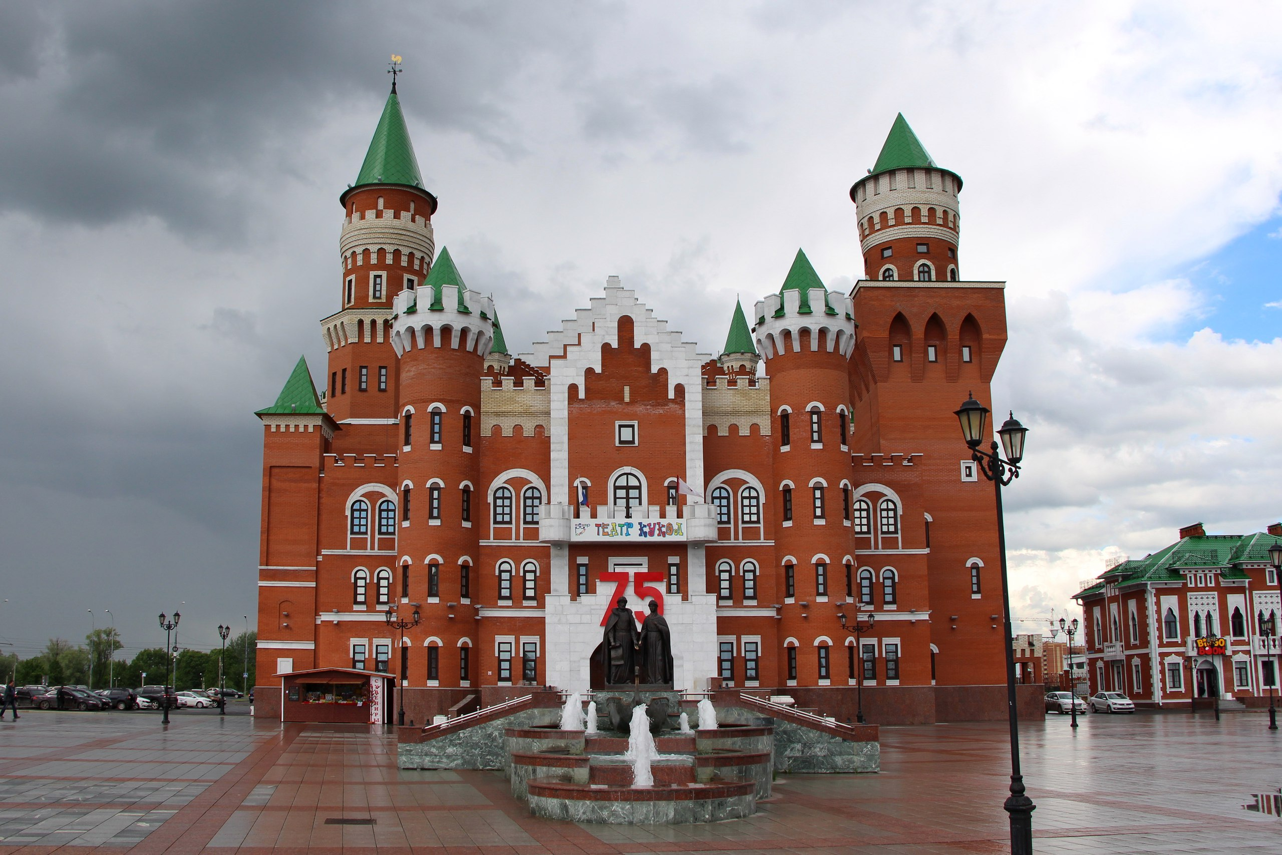 Республиканский театр кукол, город Йошкар-Ола, Республика Марий Эл